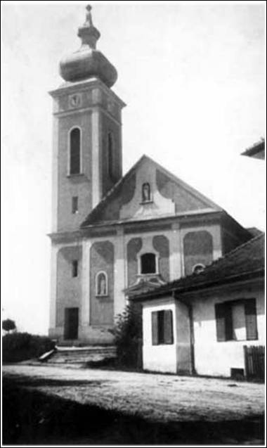 The felsőszölnökian school house